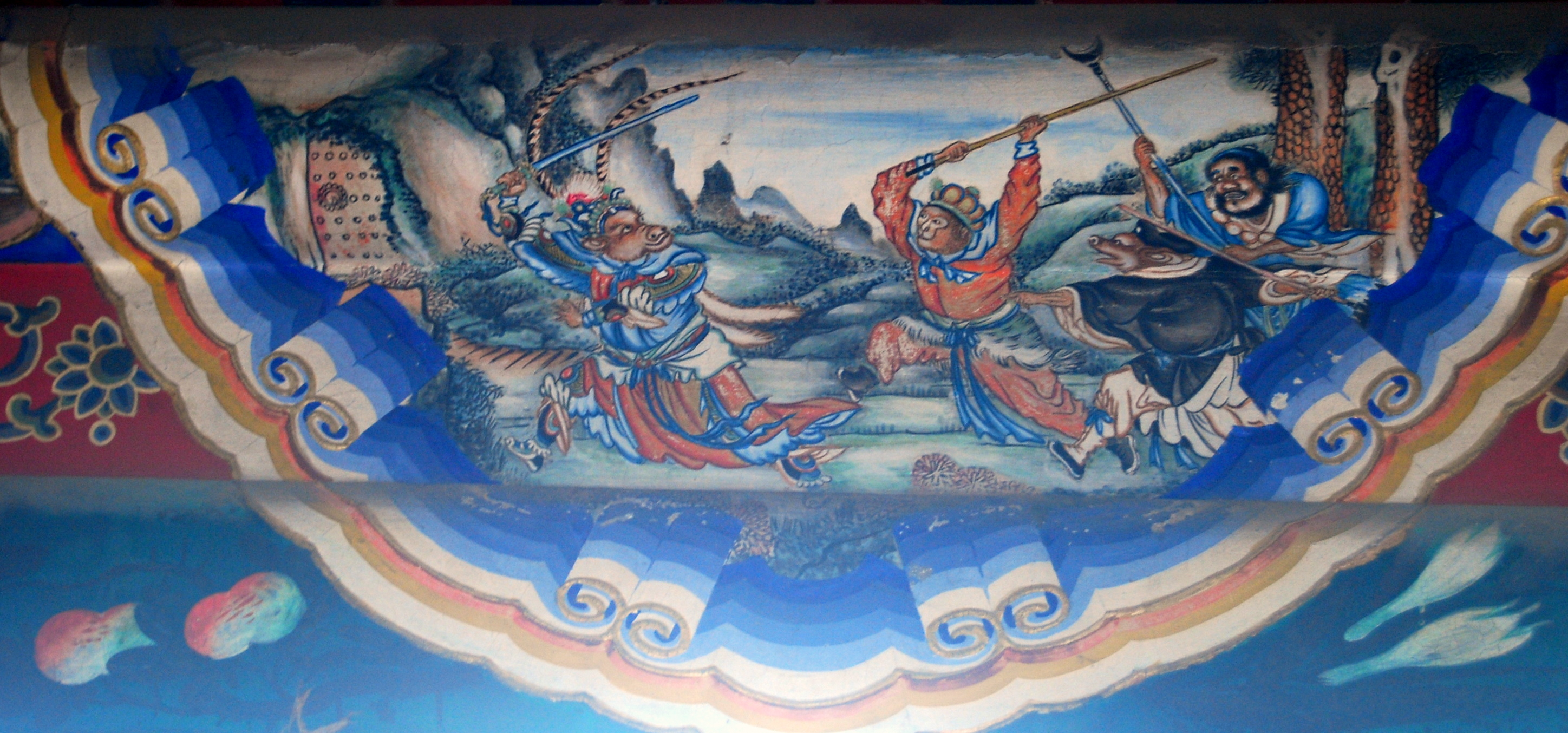 颐和园长廊彩绘：三借芭蕉扇选段——孙悟空大战牛魔王